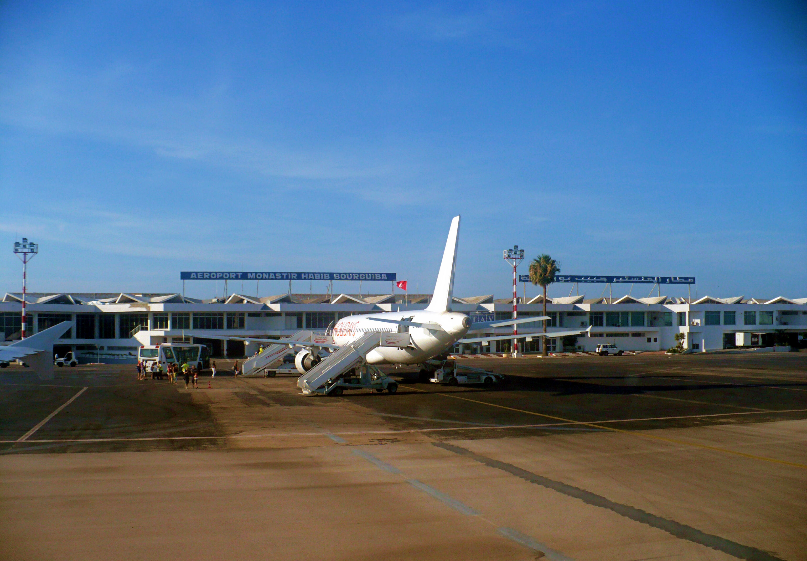 Monastyr, lotnisko im. prezydenta Habib Bourguiby